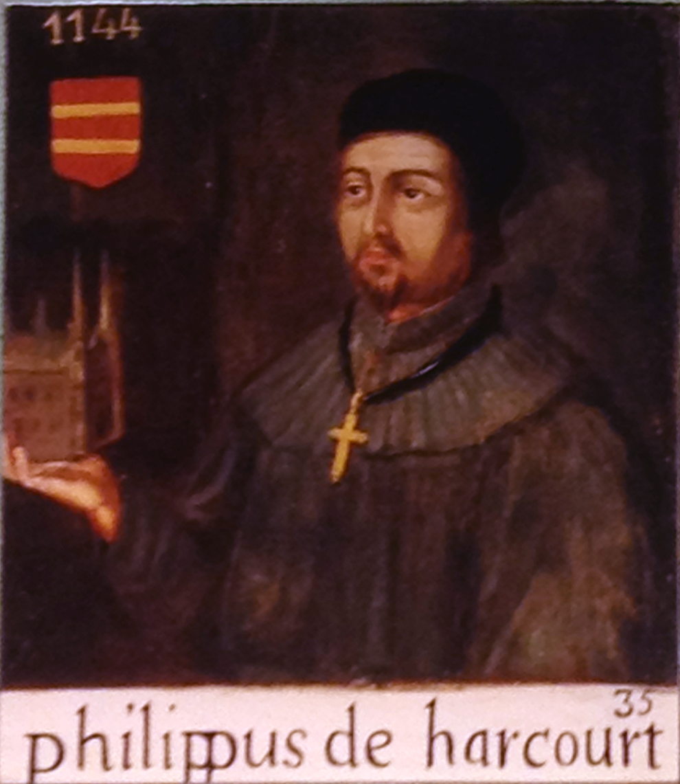 Tableau de Philippe d'Harcourt.